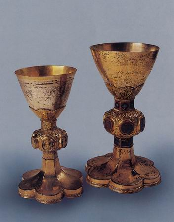 Museo dell'opera del duomo, prato, calici del Tre-Quattrocento